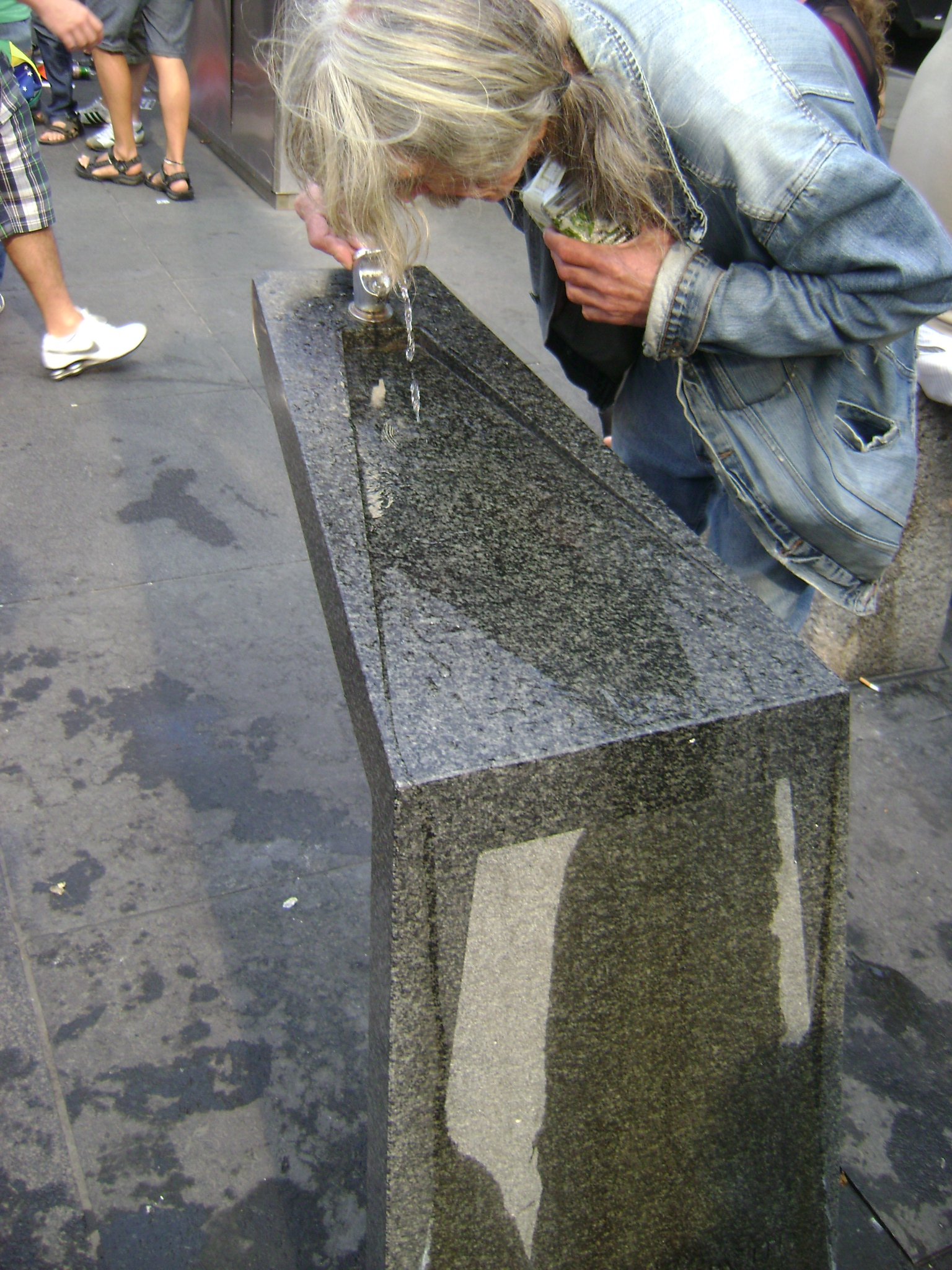 Bebedouro na Dundas Square, em Toronto, Ontário, Canadá.